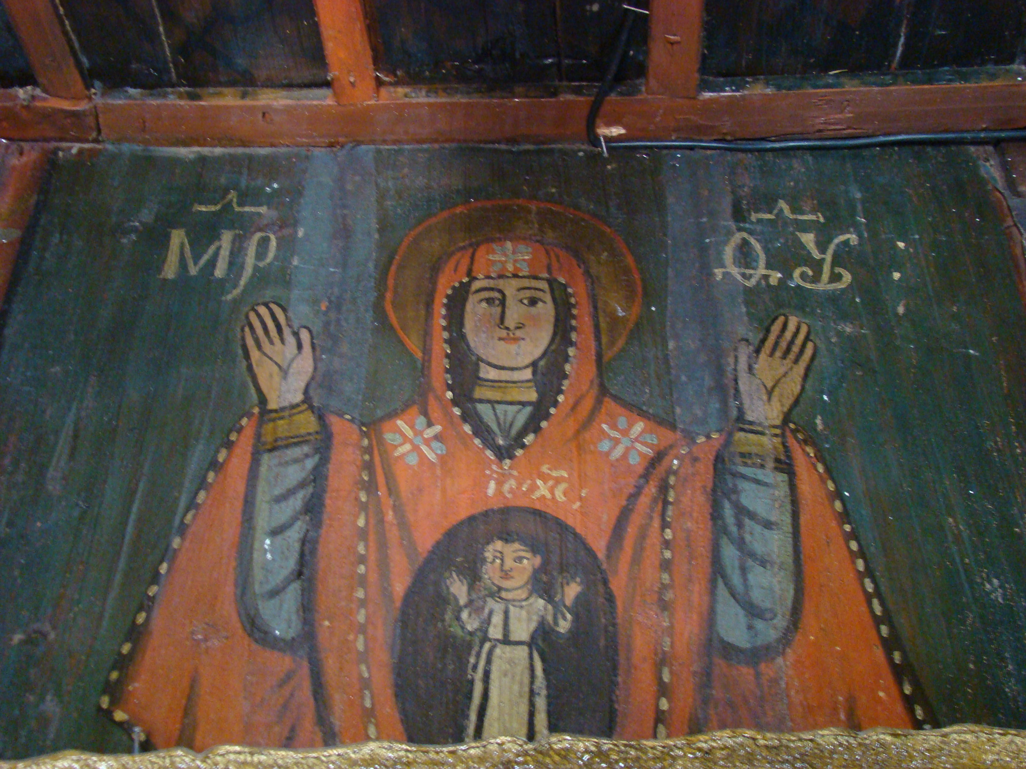 Biserica de lemn „Sf.Dumitru” din Păușa, județul Bihor